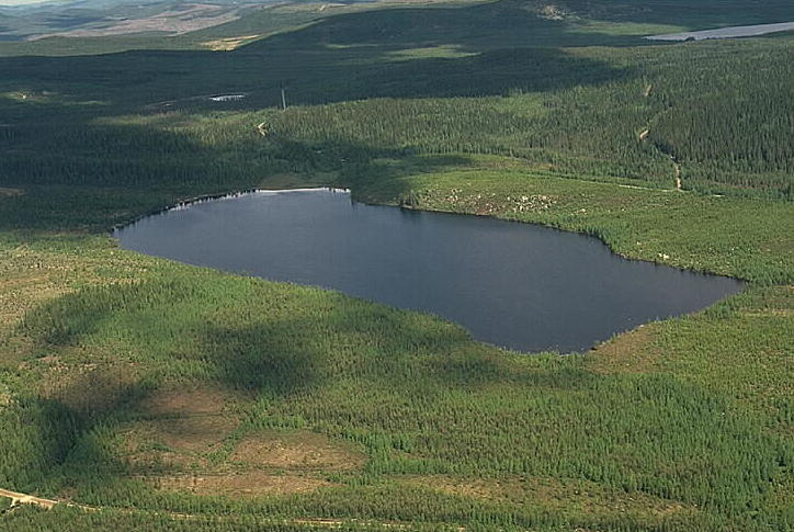 Lillsjön Motiv: Lillsjöslåttern Nyckelord: Flygbilder, Riksintressen Kategori: Insjömiljöer Lillsjön.